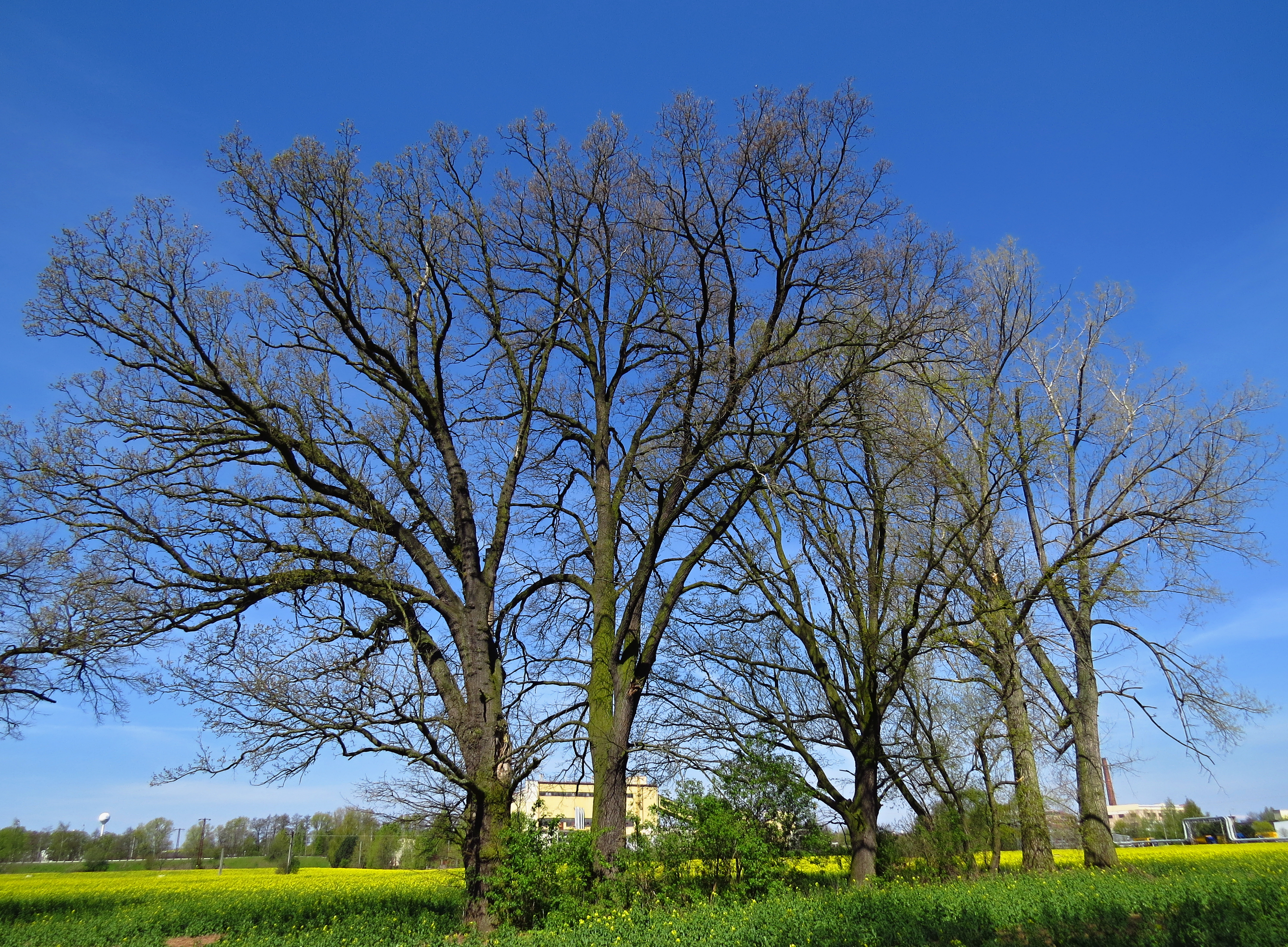 Dva památné duby letní